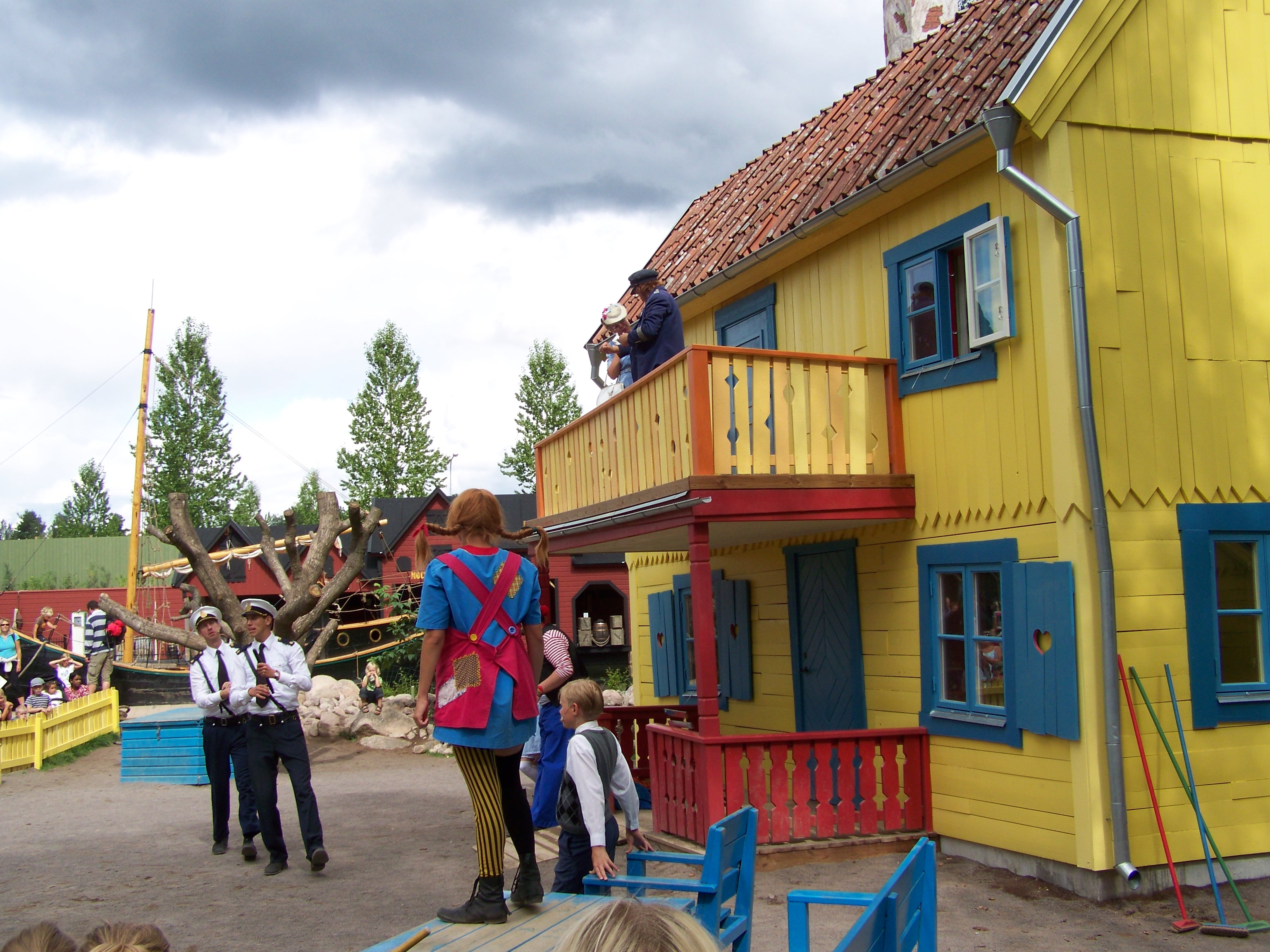 In Schweden. Astrid Lindgrens Värld